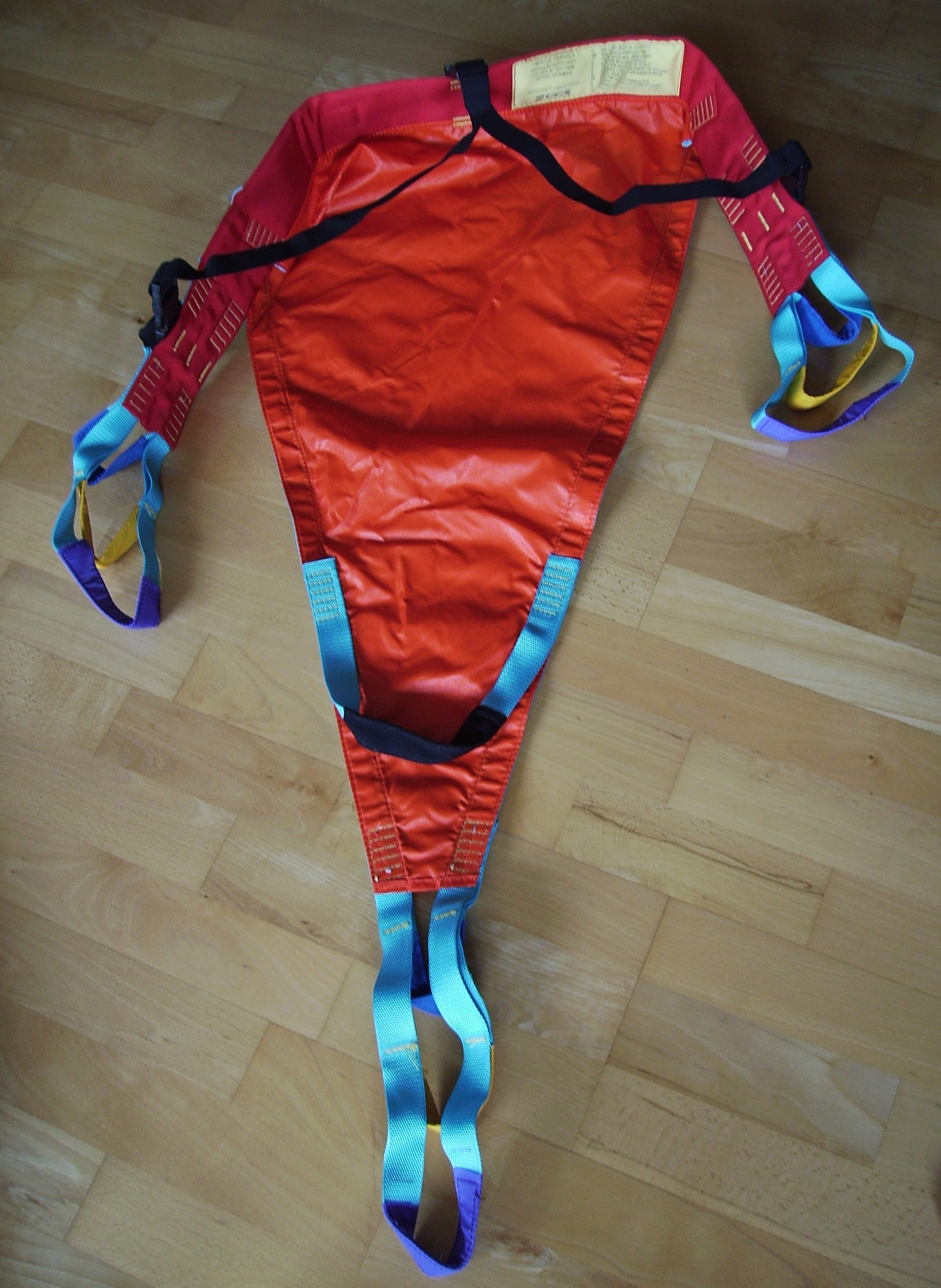 Rettungsdreieck; Rettungssitz; KONG-Sitz rescue triangle; evacuation harness; KONG-triangle